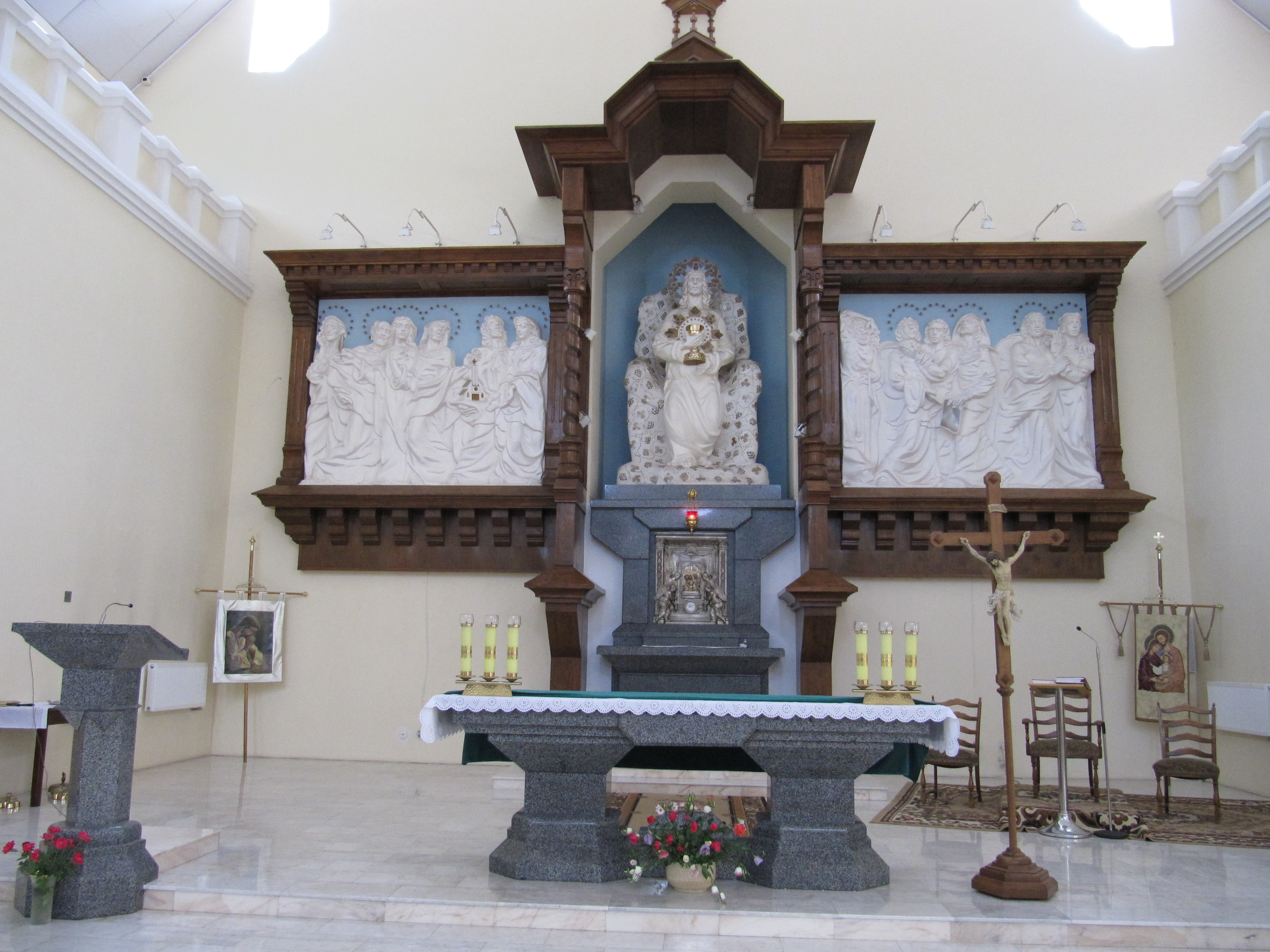 Алтарь в католической церкви Тайной Вечери в Ростове-на-Дону, Россия